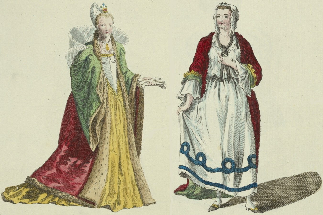 La dogaressa in abiti cinquecenteschi e una donna con la Tonda del settecento.